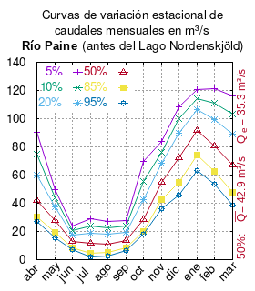 Curvas de variación estacional del río Paine antes del Lago Nordenskjöld. # Dirección General de Aguas # Diagnóstico y clasificación de los cursos y cuerpos de agua según objetivos de calidad. Cuenca del río Serrano. # Santiago de Chile # Ministerio de Obras Públicas (Chile) # 2004 # url: # urlarchivo: # Tabla 4.7: Río Paine en Parque Nacional 2 (m3/s), pág. 30 mes 5% 10% 20% 50% 85% 95% abr 90.463 74.607 60.088 42.174 30.645 26.889 may 49.924 43.861 37.495 27.784 19.207 15.463 jun 24.025 20.918 17.688 12.837 8.650 6.859 jul 28.779 23.995 19.007 11.474 4.782 1.746 ago 27.102 22.588 17.916 10.948 4.996 2.475 sep 27.891 23.659 19.384 13.244 8.284 6.289 oct 69.613 55.162 42.629 28.397 20.313 17.973 nov 83.774 76.363 68.258 55.084 42.297 36.219 dic 108.215 99.692 89.777 72.580 54.633 45.659 ene 120.334 114.039 106.414 91.840 73.890 63.346 feb 121.500 111.045 99.579 80.856 62.559 53.808 mar 116.303 103.004 88.919 67.117 47.466 38.732 This plot was created with Gnuplot.